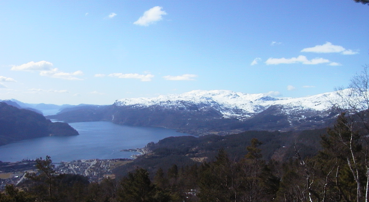 Utsikt mot Saudafjorden.